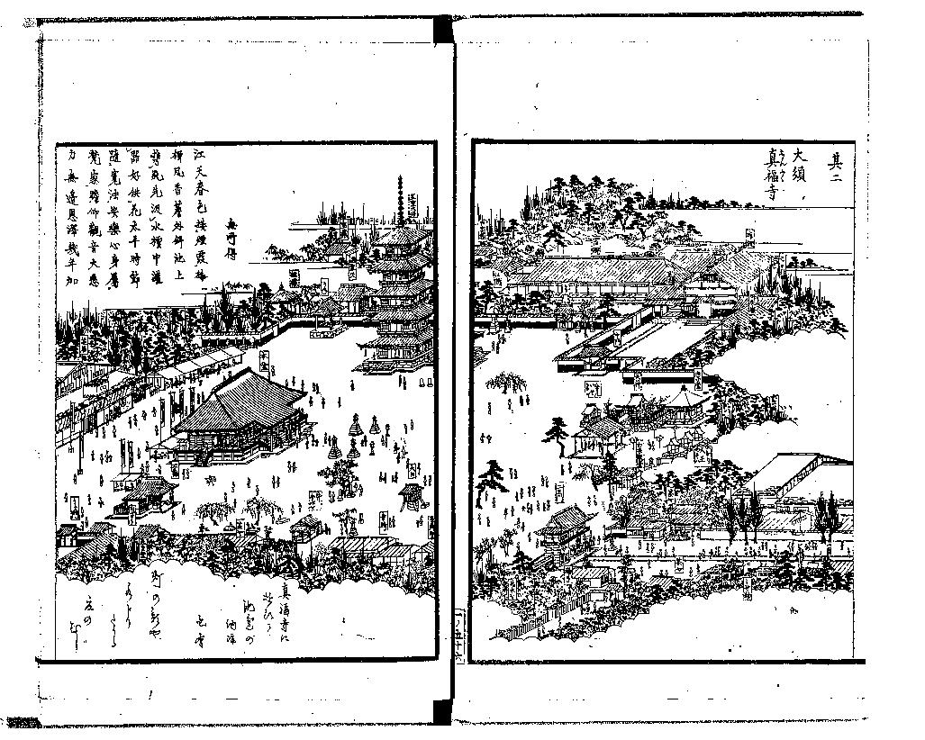 かつての大須観音（『尾張名所図会. 前編 巻１ 愛智郡』より「大須 真福寺」）